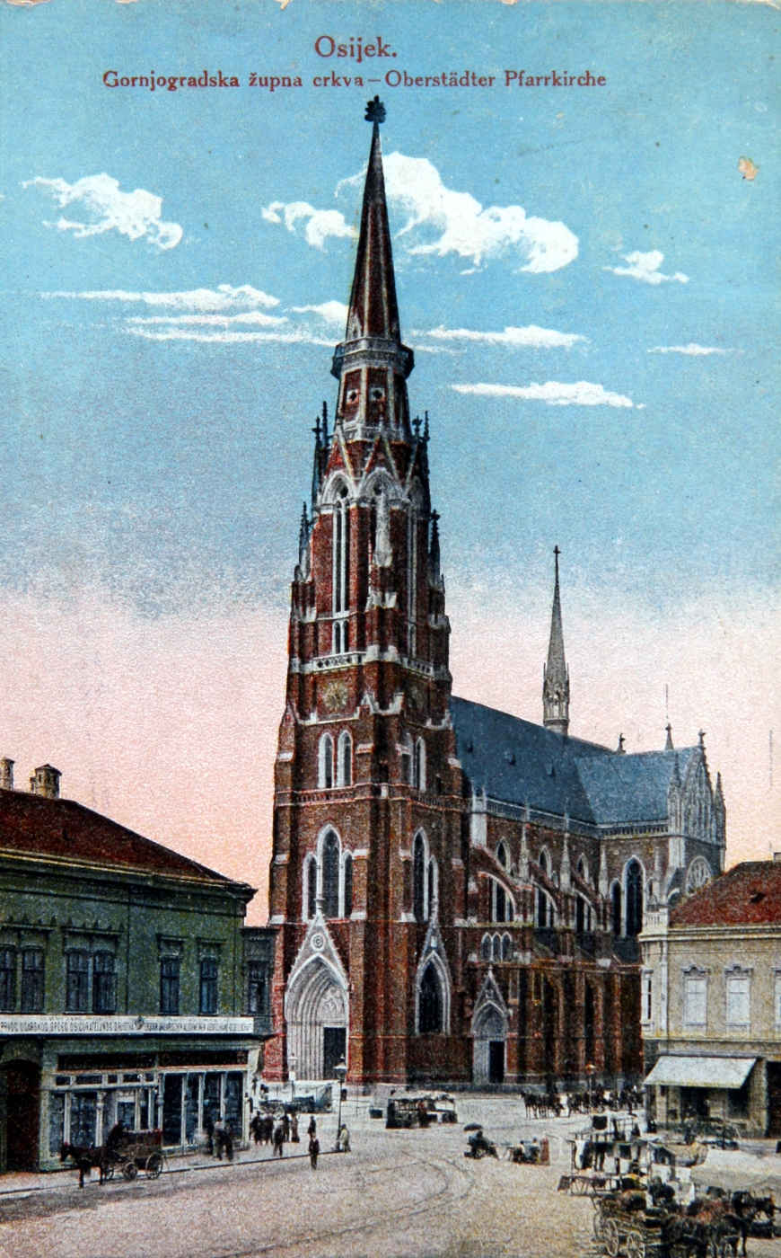 župna crkva Sv. Petra i Pavla u Osijeku, Hrvatska